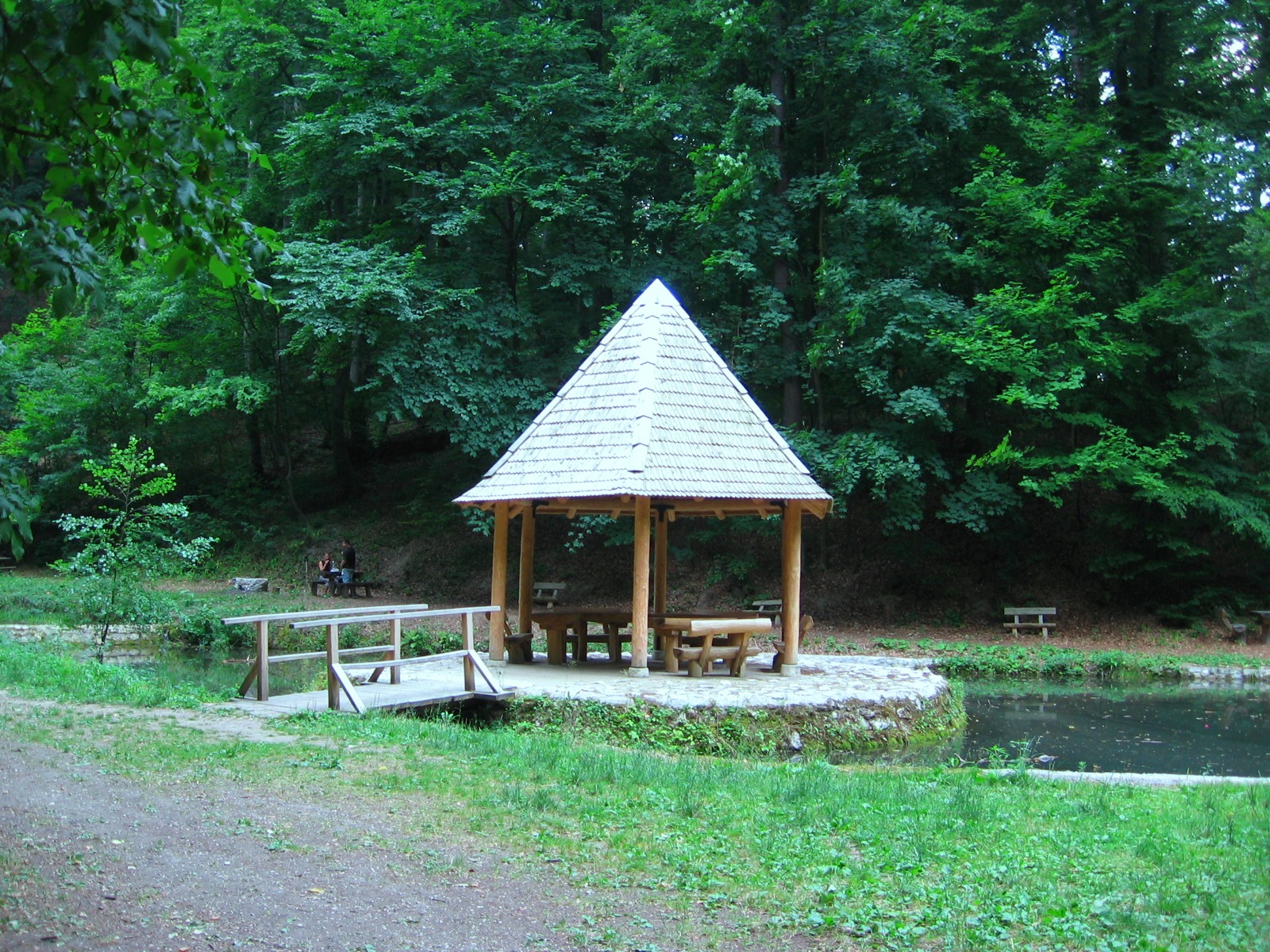 2015, Andó-kút